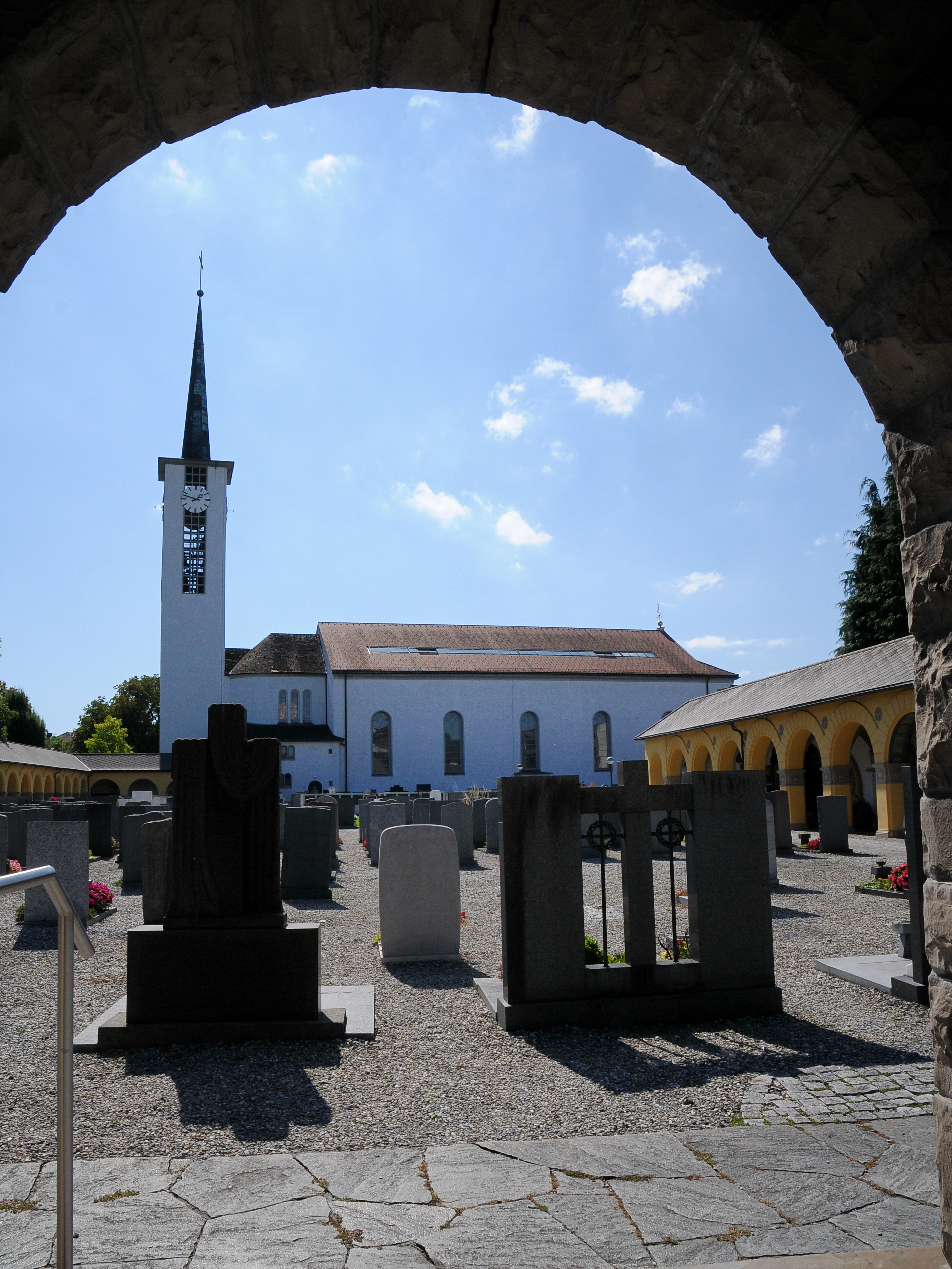 Pfarrkirche Hll. Peter und Paul, erbaut 1830 nach Plänen von Alois Negrelli in Lustenau, Vorarlberg .